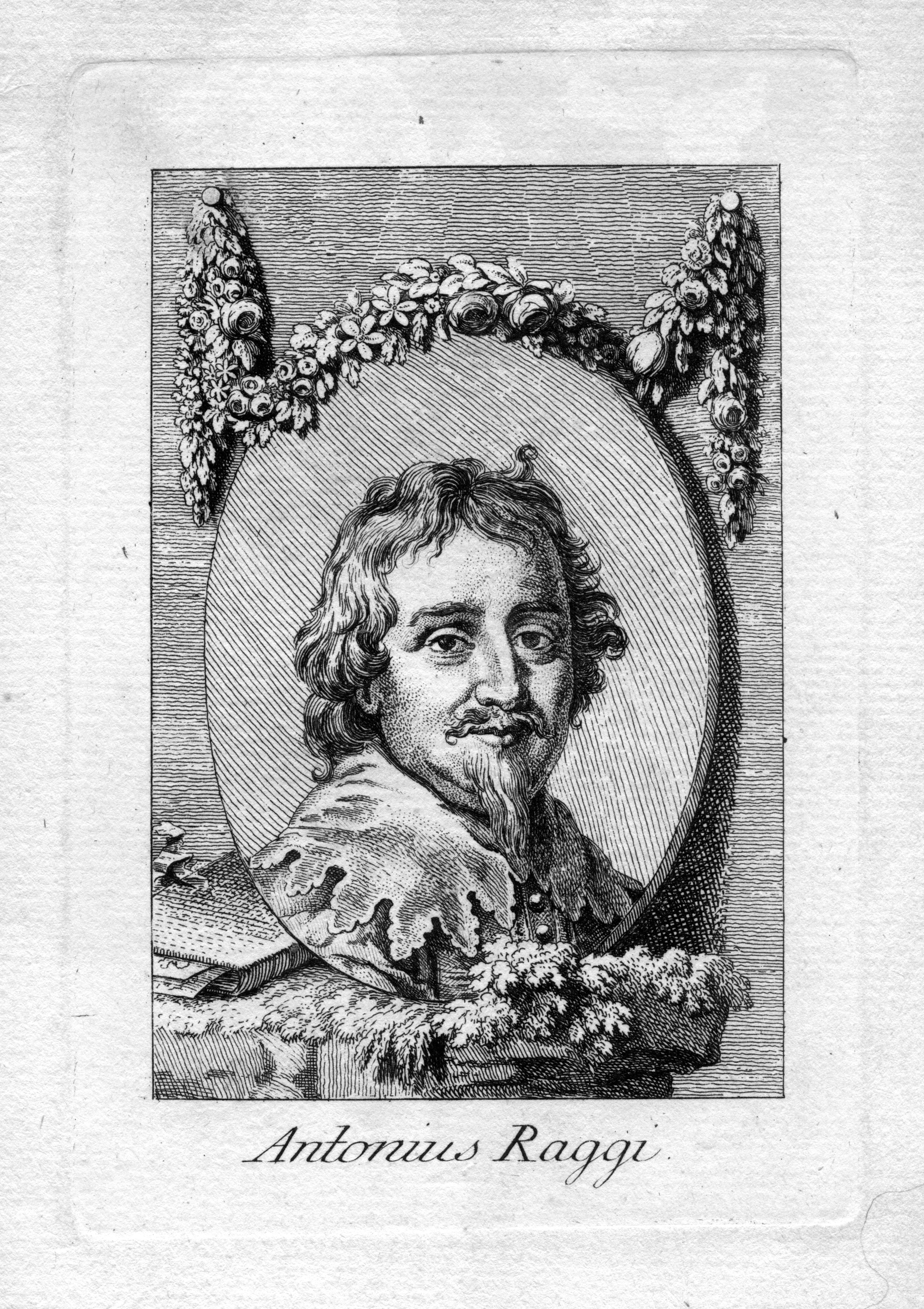 Portrait des Bildhauers Antonio Raggi.